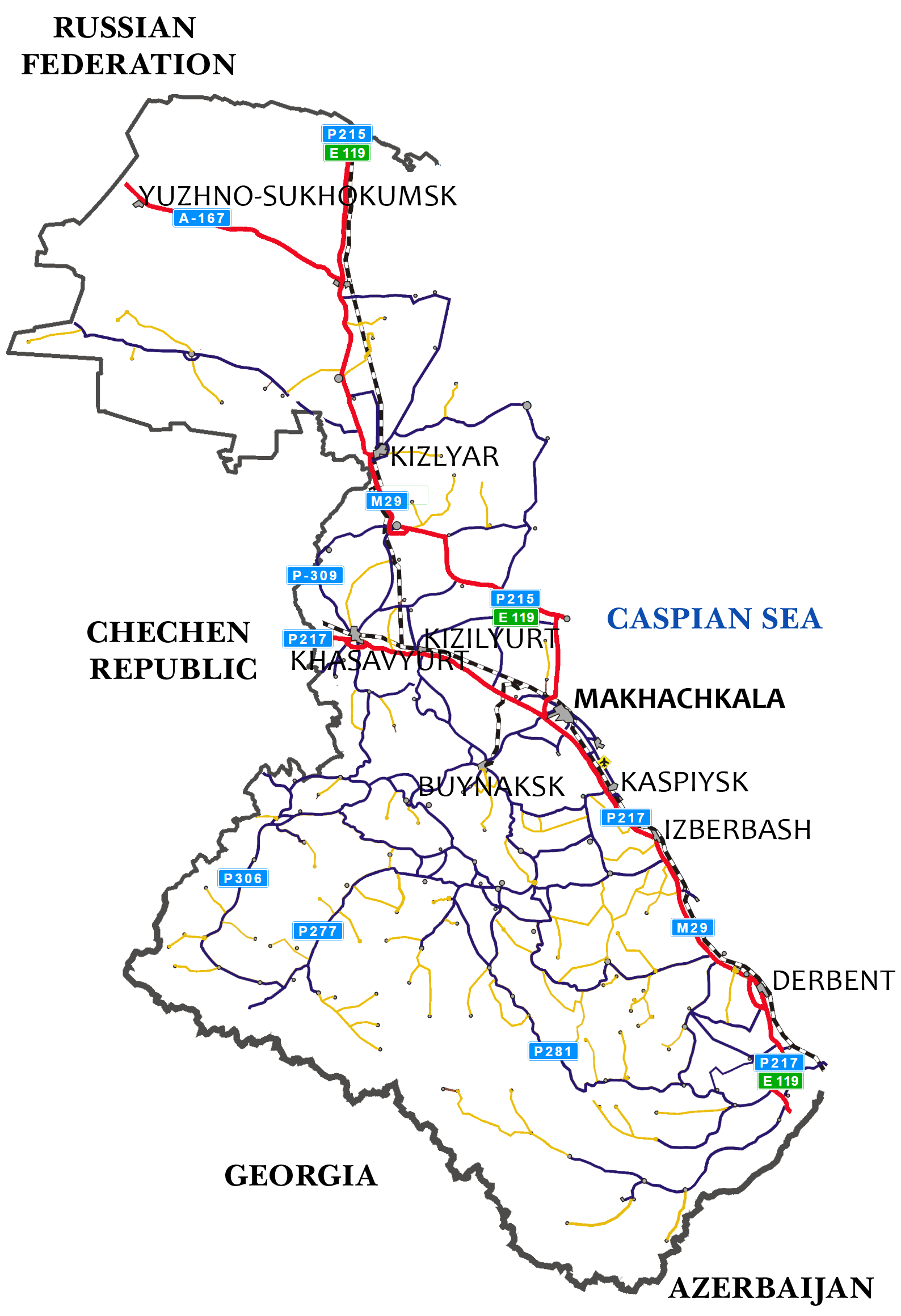 Карта автомобильных дорог Дагестана Авар: Дагъистаналъул гьакинухазул карта